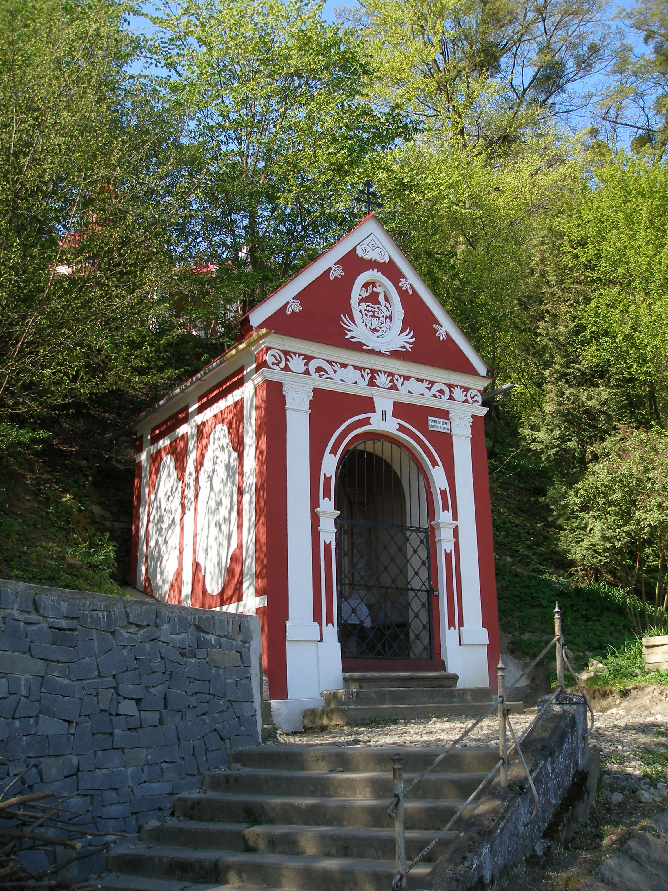 Kaplnka na Kalvárii v Prešove. II. zastavenie Ježiš na Olivovej hore.